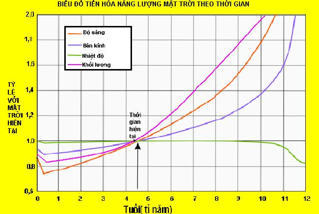 Biểu đồ tiến hóa năng lượng Mặt Trời